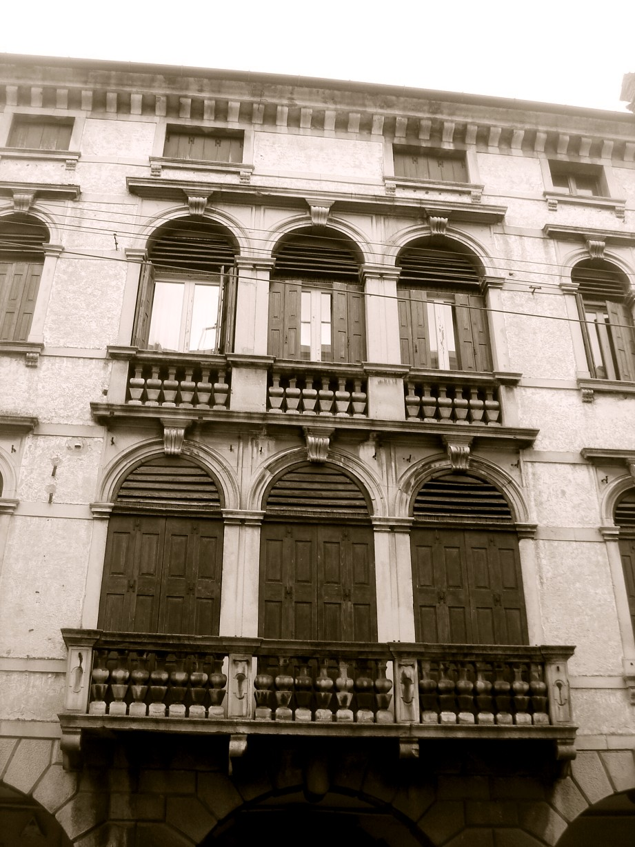 Conegliano (Treviso): le trifore di Palazzo Gera Minucci su via Cavour.